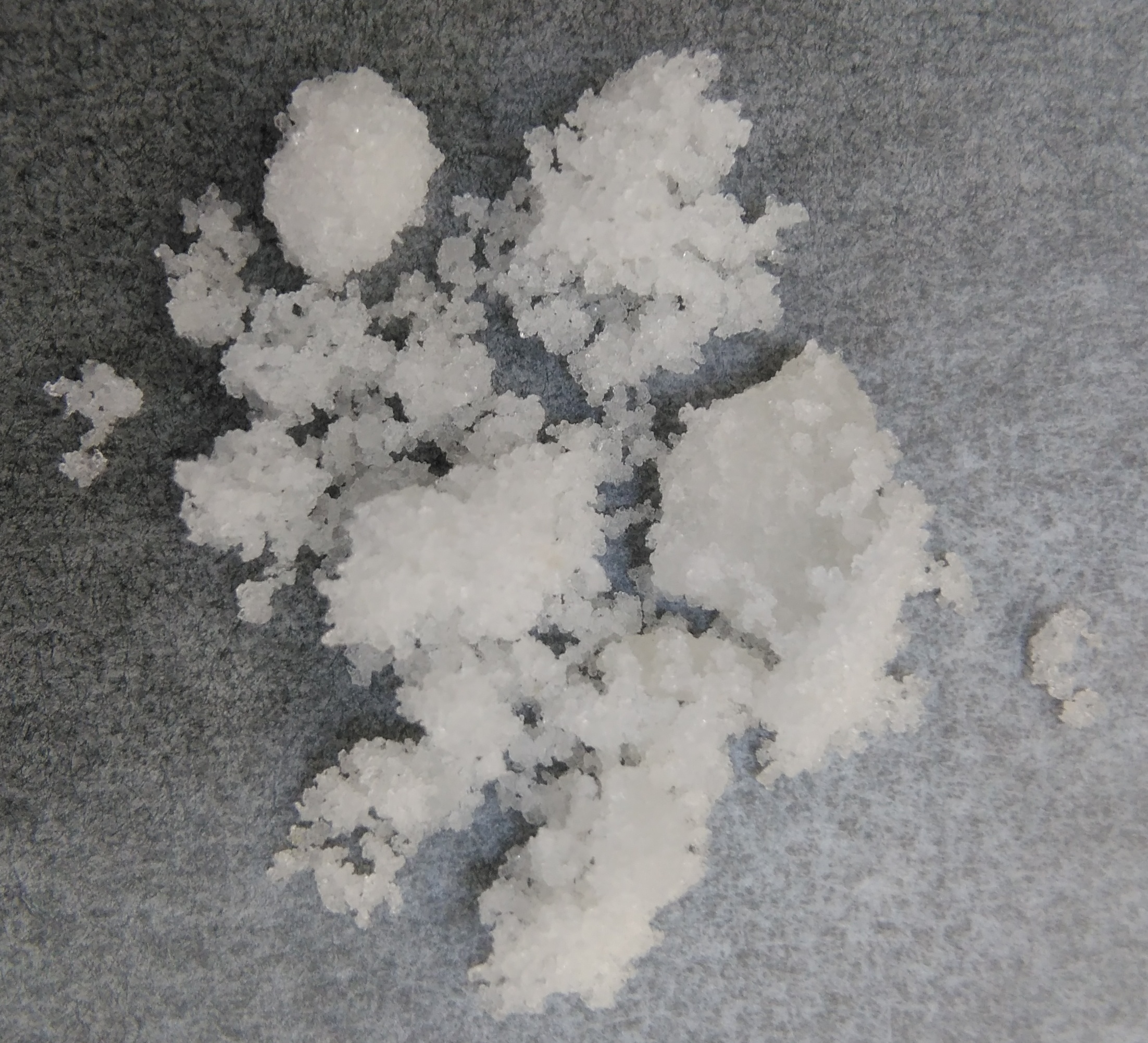 氢氧化铯一水合物，99.9% metals basis，Macklin试剂。